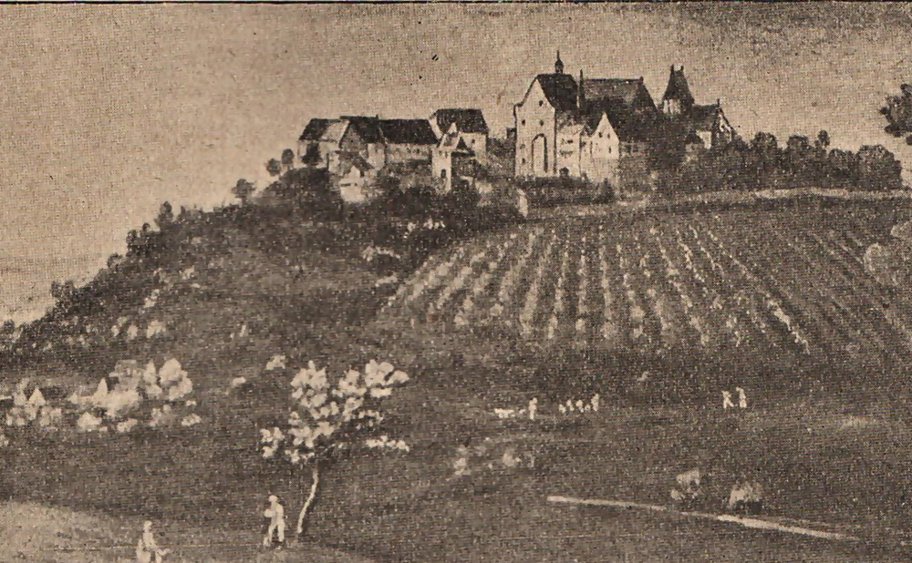 Burg Neubolanden 1613